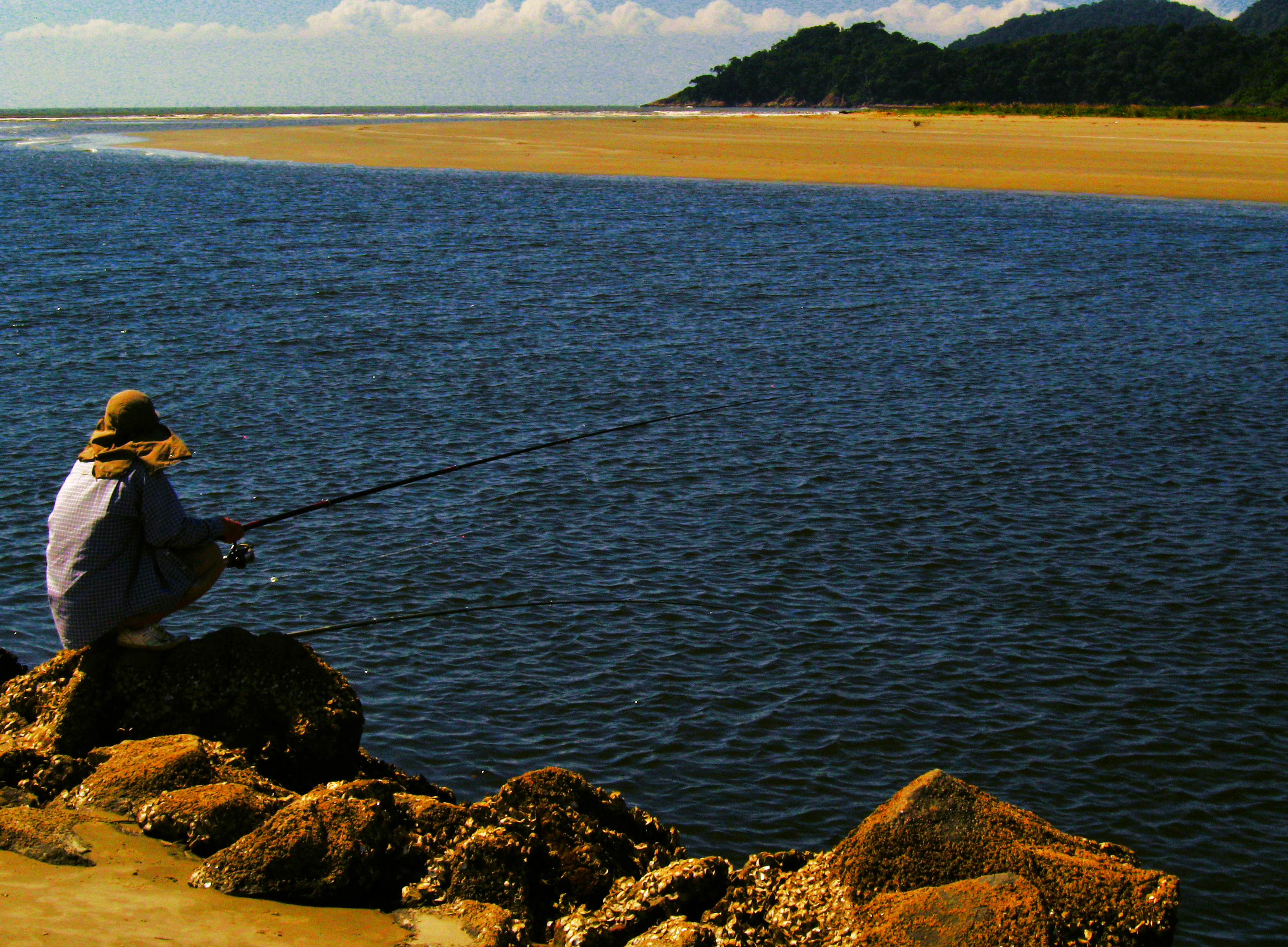 Maciço da Juréia